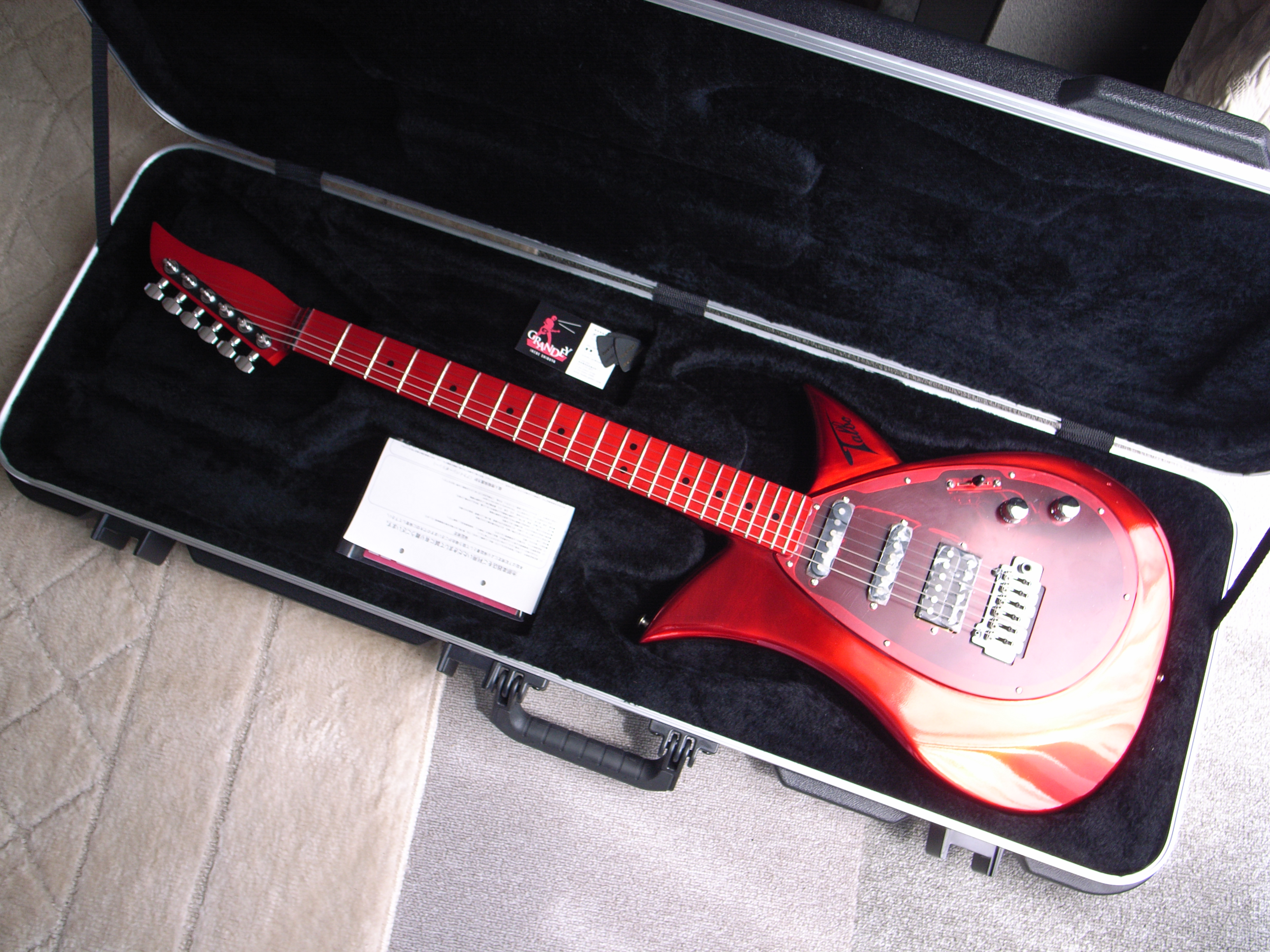 Tokai Talbo Guitar